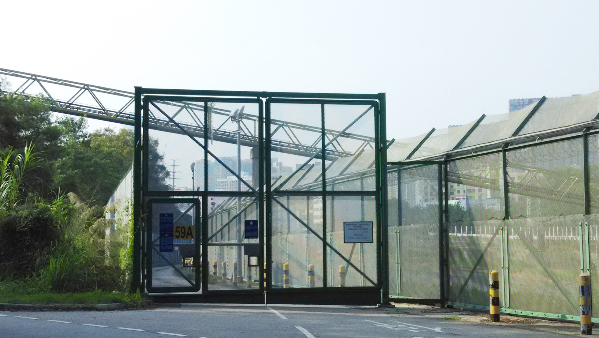 中文（香港）: 圍網後的道路便是邊境道路